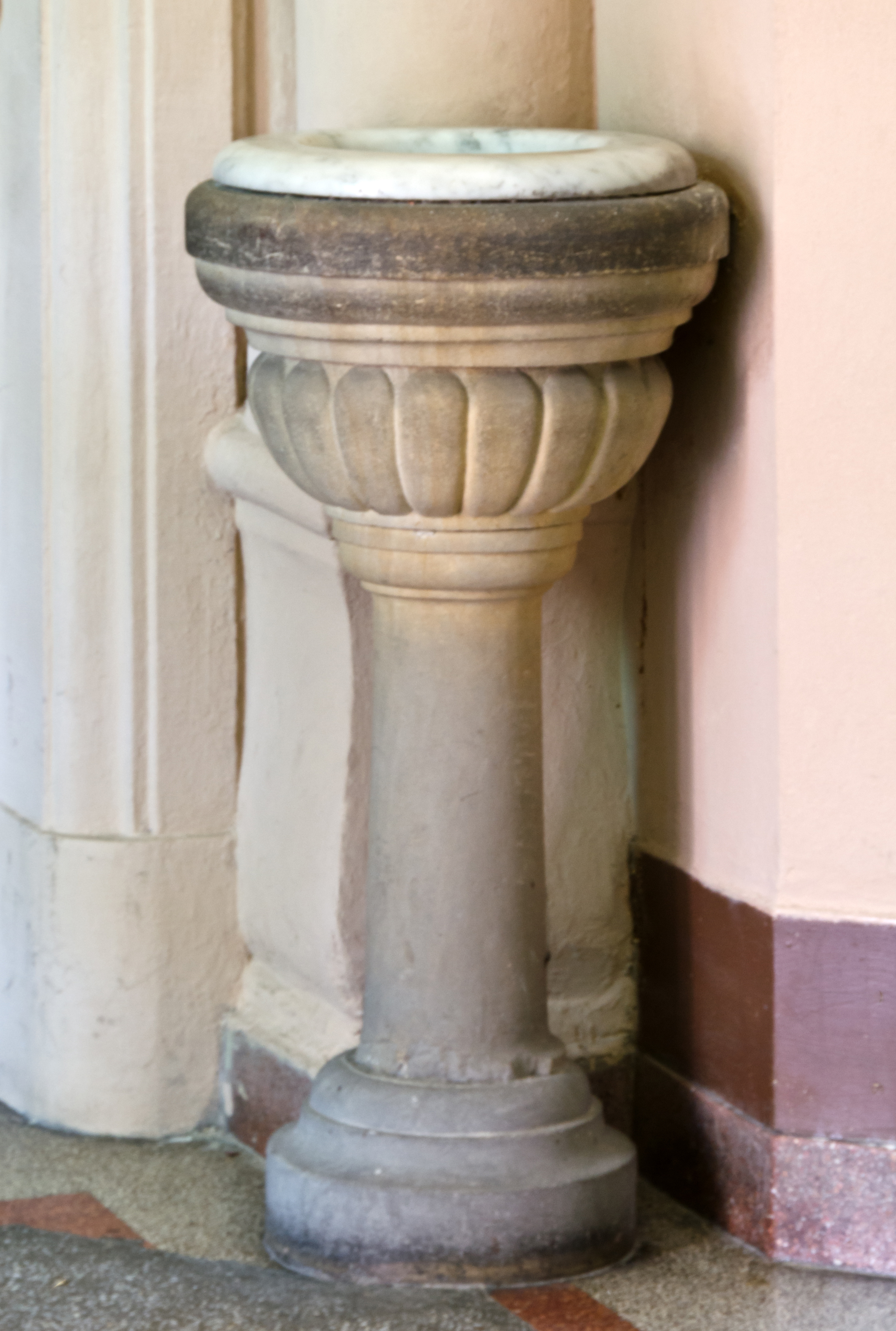 Polanica-Zdrój, kościół par. p.w. Wniebowzięcia NMP, 1910